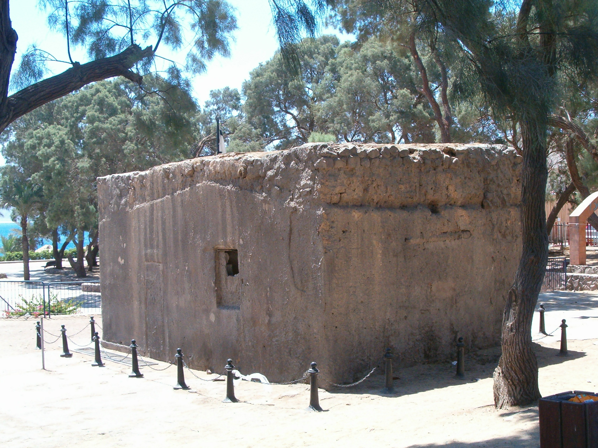 מבנה המשטרה של אום רשרש, באילת, כחלק ממיצג הנפת דגל בדיו באילת בסיום מבצע עובדה.